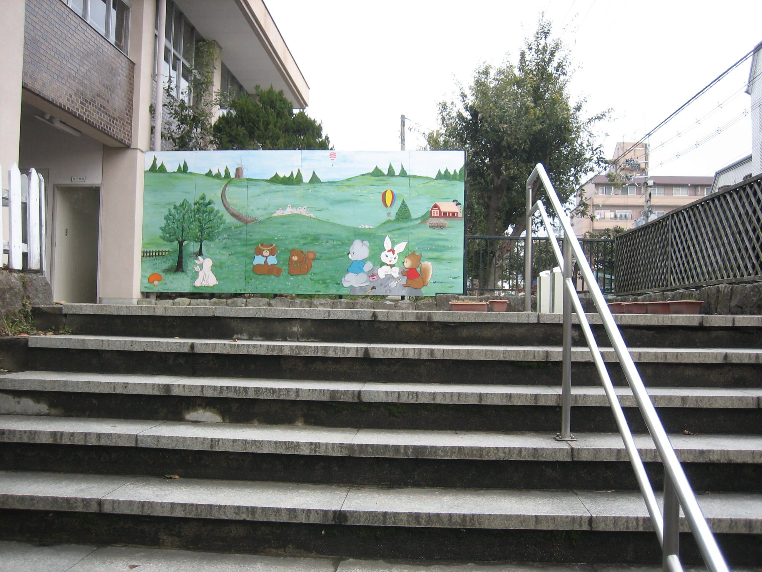 大宮交通公園を園内から撮影